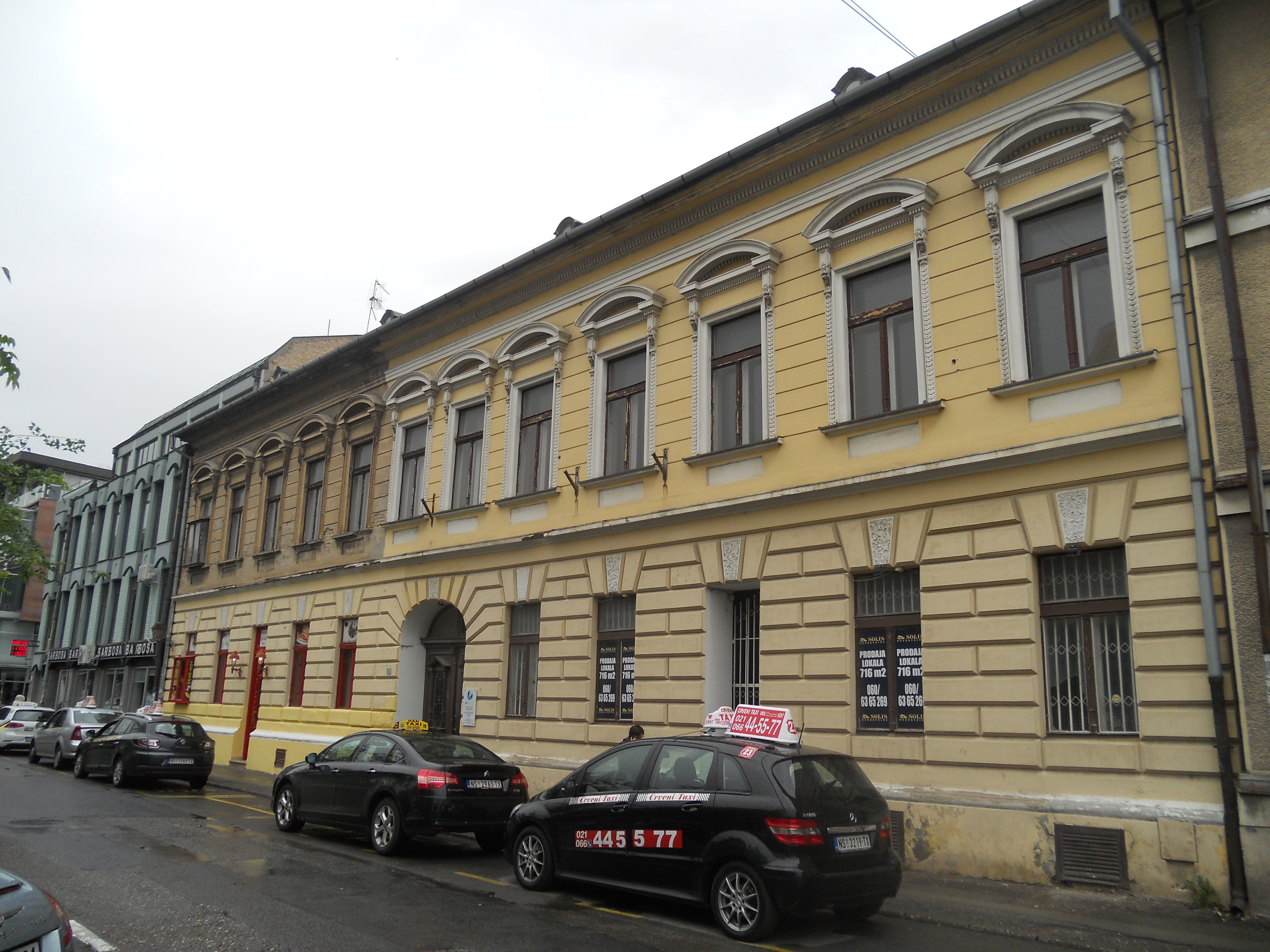 Trifkovićev trg